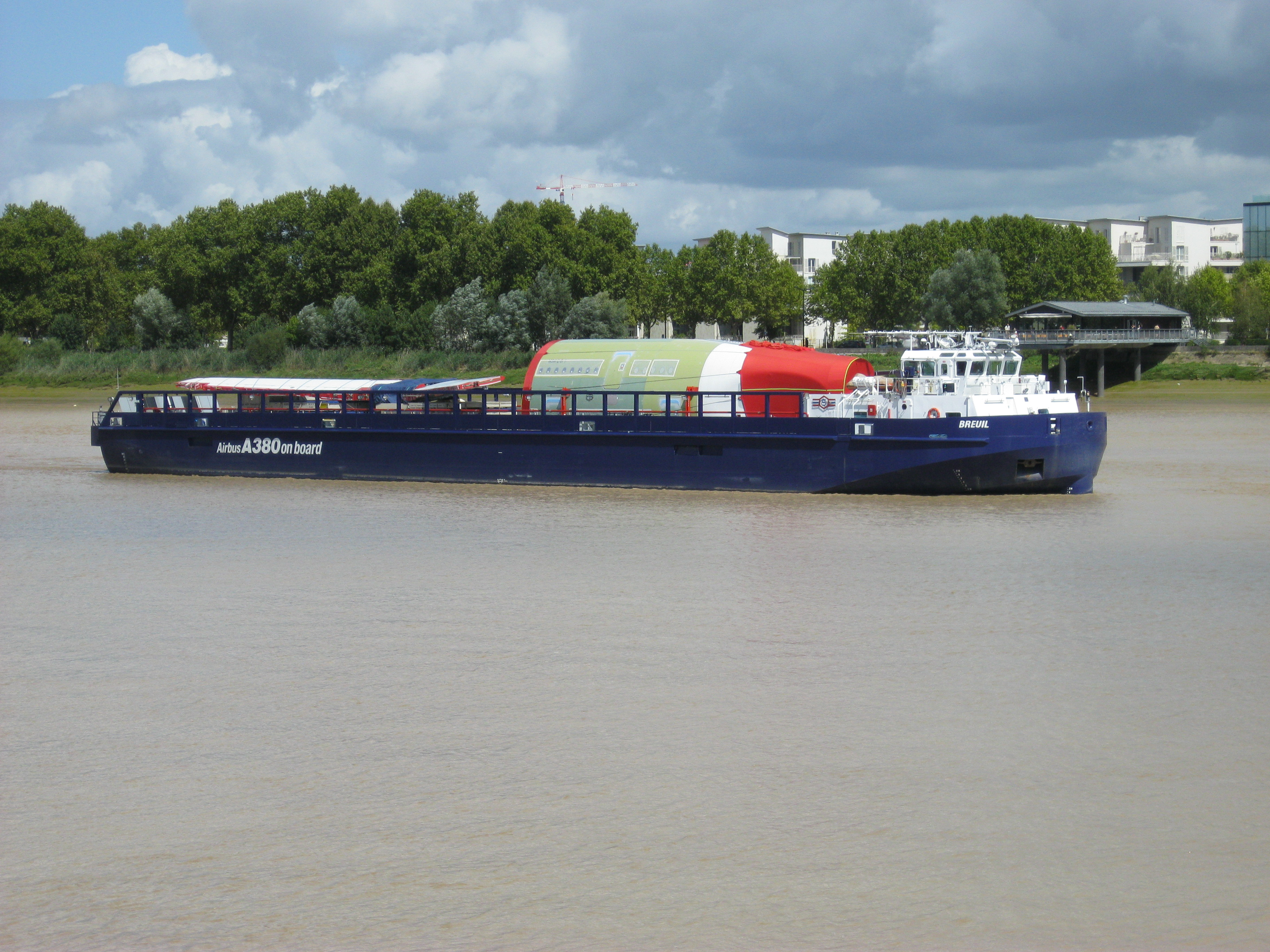 Transport Airbus A380 en construction sur la Garonne sur la barge "Breuil"